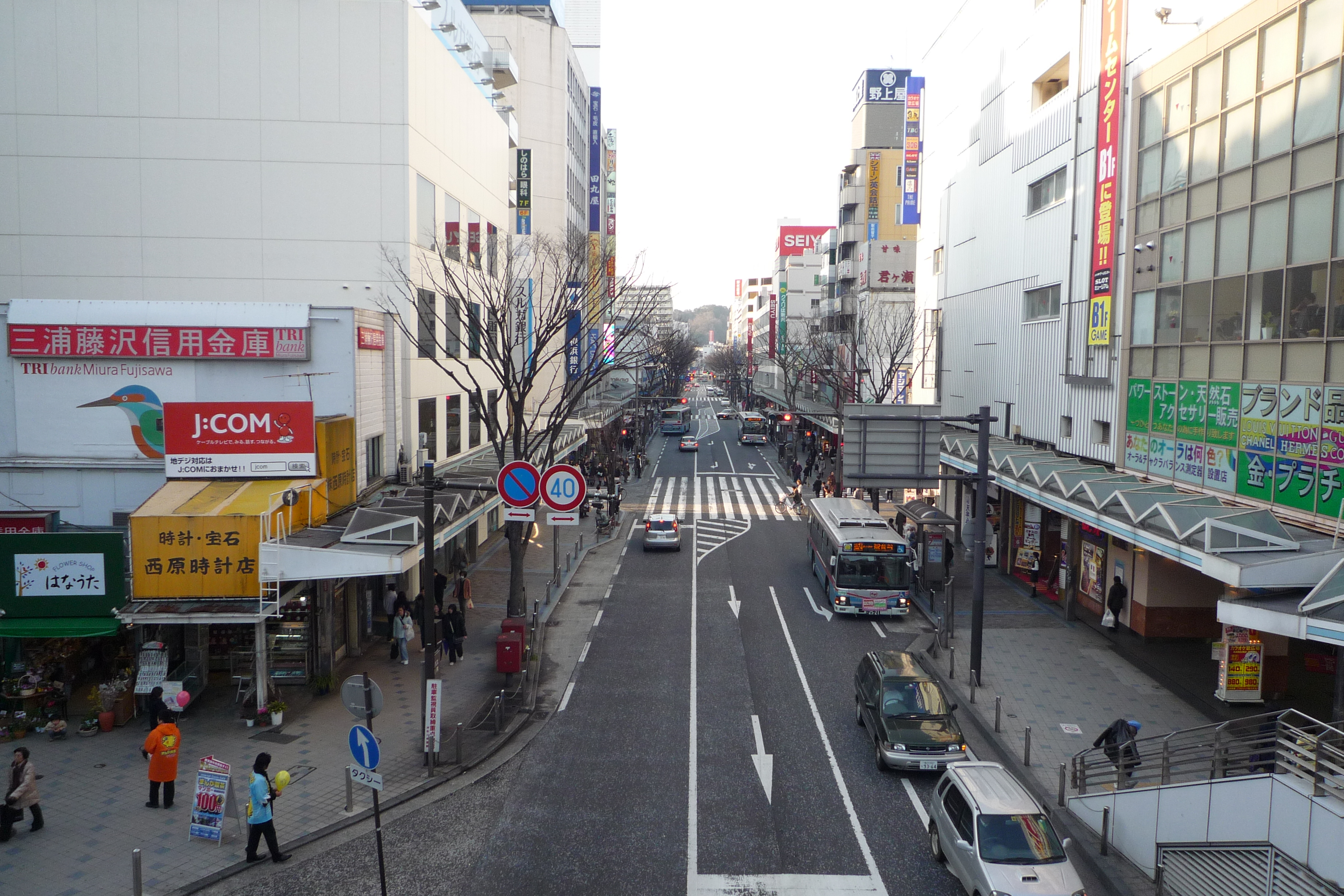 横須賀中央の町並みを映した画像。